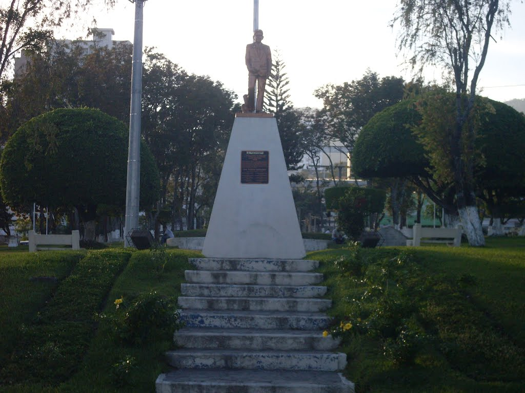 Estatua De Alberto Masferrer en San Salvador.fue uno de los escritores más destacados a lo largo de la historia de su pais. logró tocar varios géneros que le hicieron ganarse el respeto y la admiración de la mayoría de los Intelectuales de su epoca.